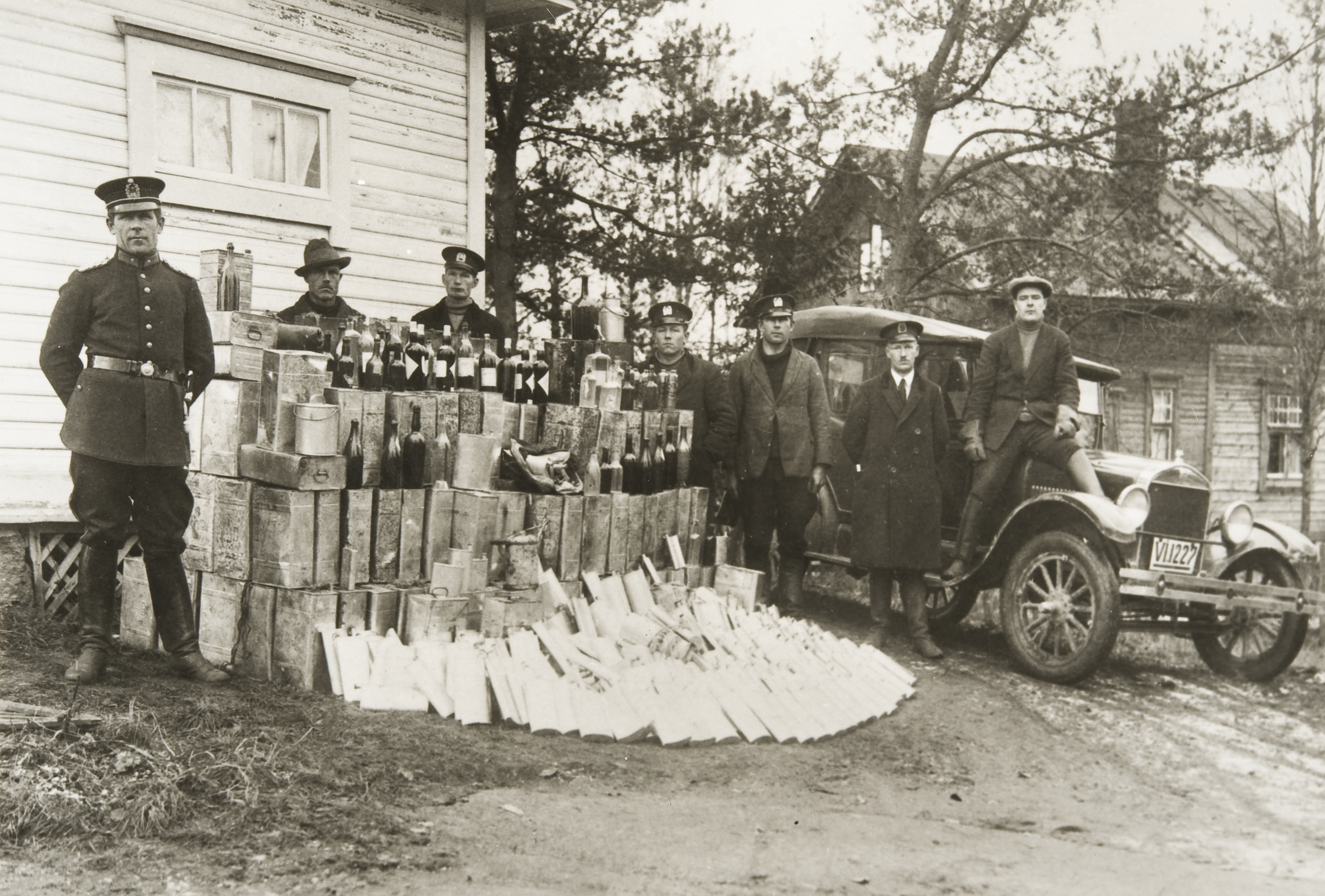 alkoholin salakuljettajilta kieltolain aikaan takavarikoitua saalista; vaaka, mustavalkoinen, kiinnitetty kartonkiin, jonka koko 33 x 23 cm